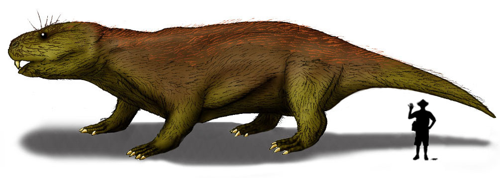 Bocatherium mexicanum era un pequeño Tritylodontidae que vivió durante el Jurásico en México